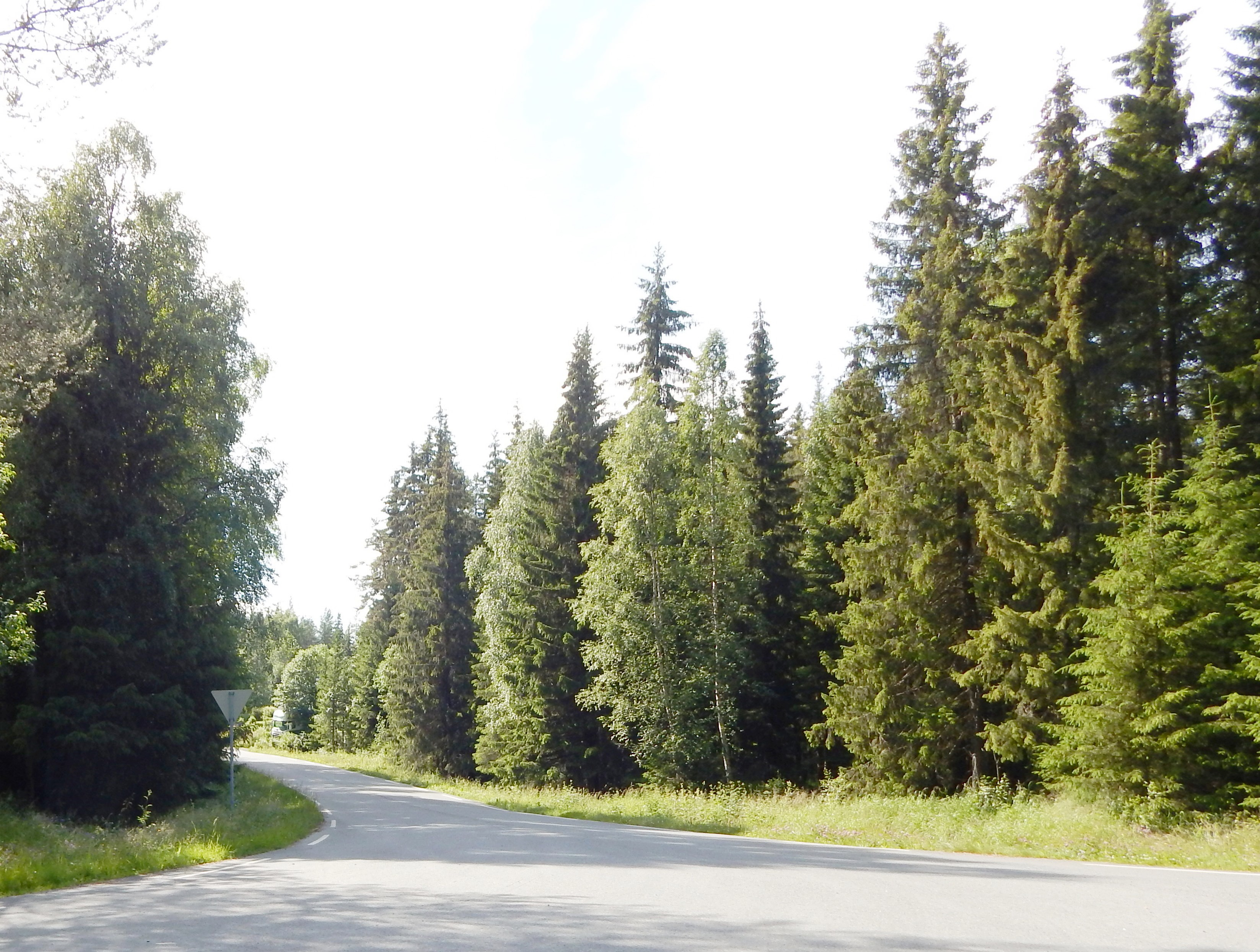 Næravegen (FV1666, tidl. 11) nær fylkesvei 216 nordøst for Næroset